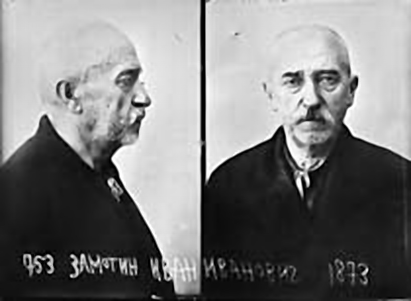 Іван Замоцін, беларускі літаратуразнавец, турэмны здымак.